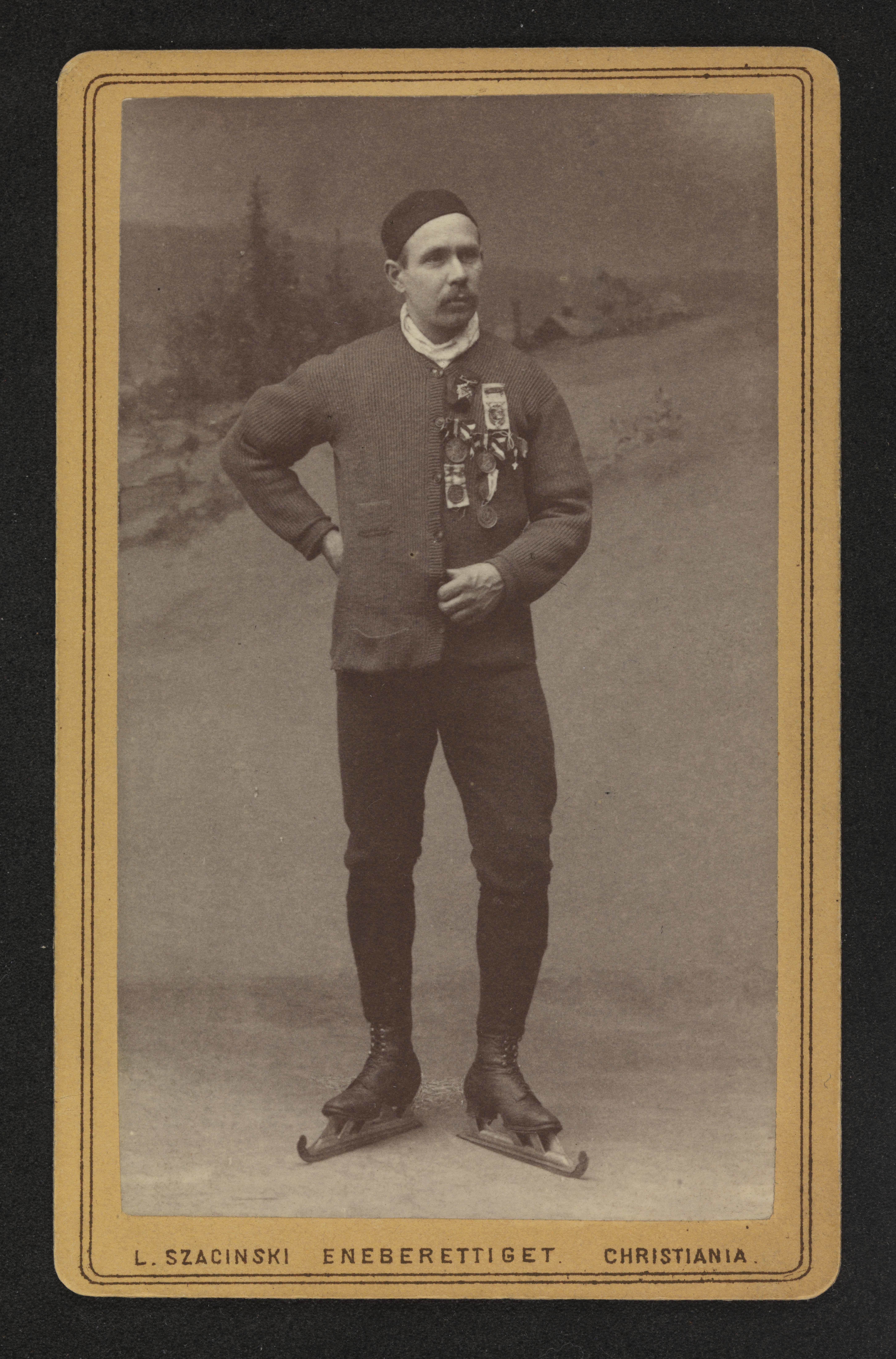 Bildet er hentet fra Nasjonalbibliotekets bildesamling Depicted person: Axel Paulsen